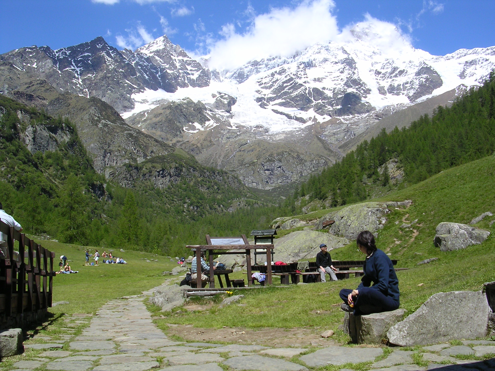 Vista del monterosa dall'alpe Pile